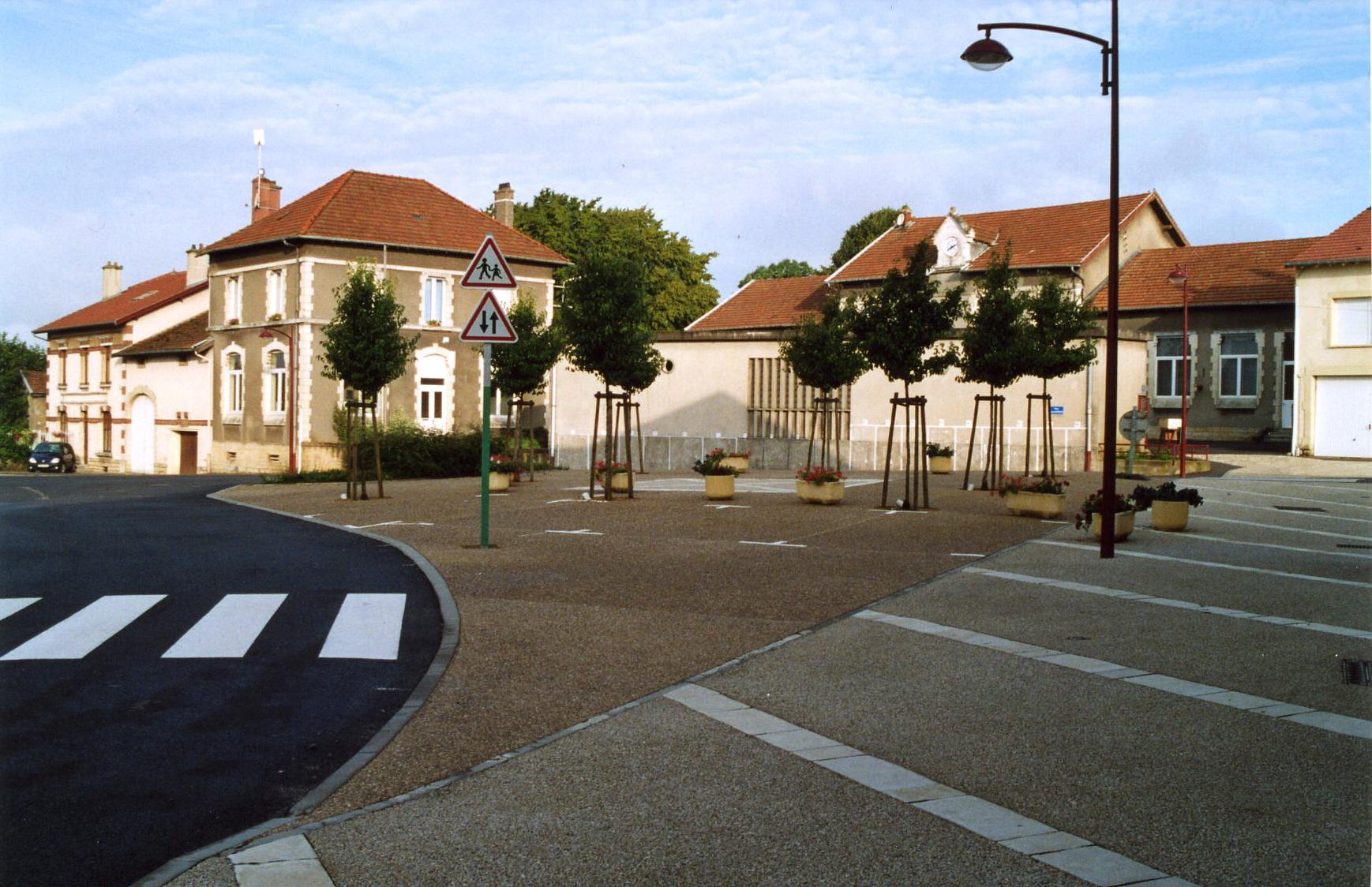 LANDRES (Meurthe et Moselle) Mairie et Ecole maternelle et primaire